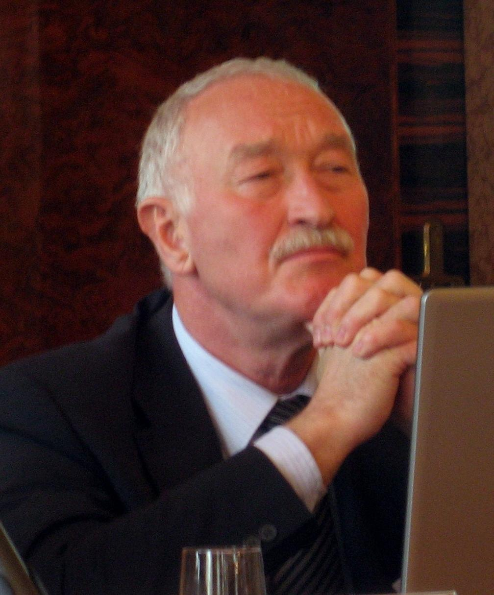 František Šebej